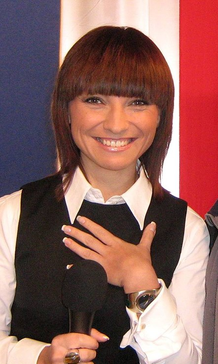 Marzena Sienkiewicz - polska dziennikarka telewizyjna.